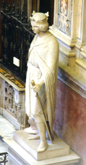 Monumento a Corradino di Svevia nella Basilica del Carmine Maggiore in Napoli